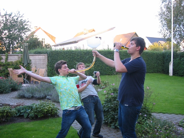 Ebba Beskriver visuelt hvorledes instrumentet benyttes i praksis, og illustrerer teksten meget godt